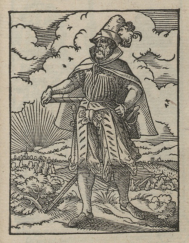 Original image description from the Deutsche Fotothek Ständebuch & Amt & Militär & Feldwebel